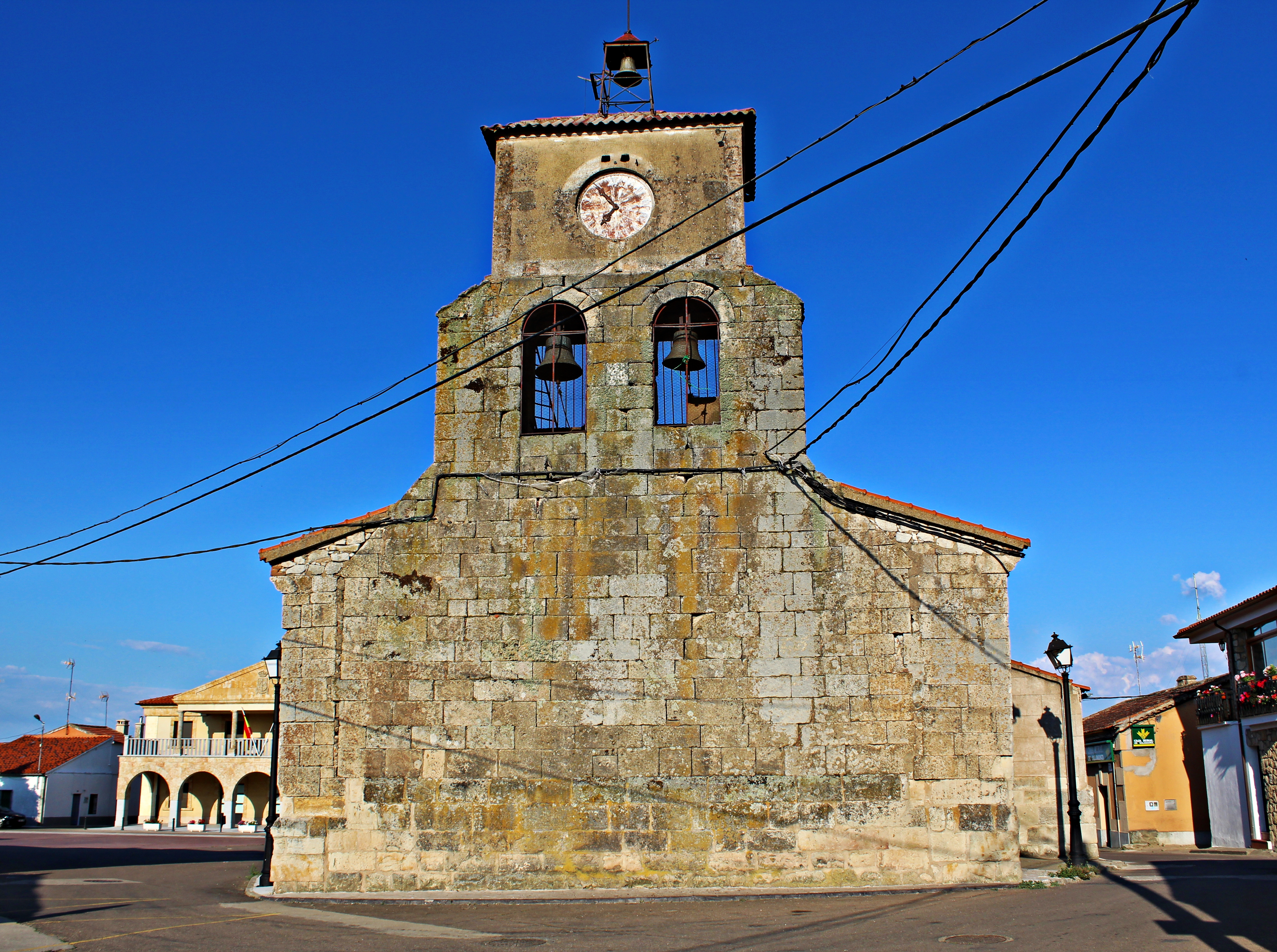 Valdelosa, provincia de Salamanca